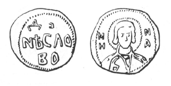 Пячатка епіскапа Міны